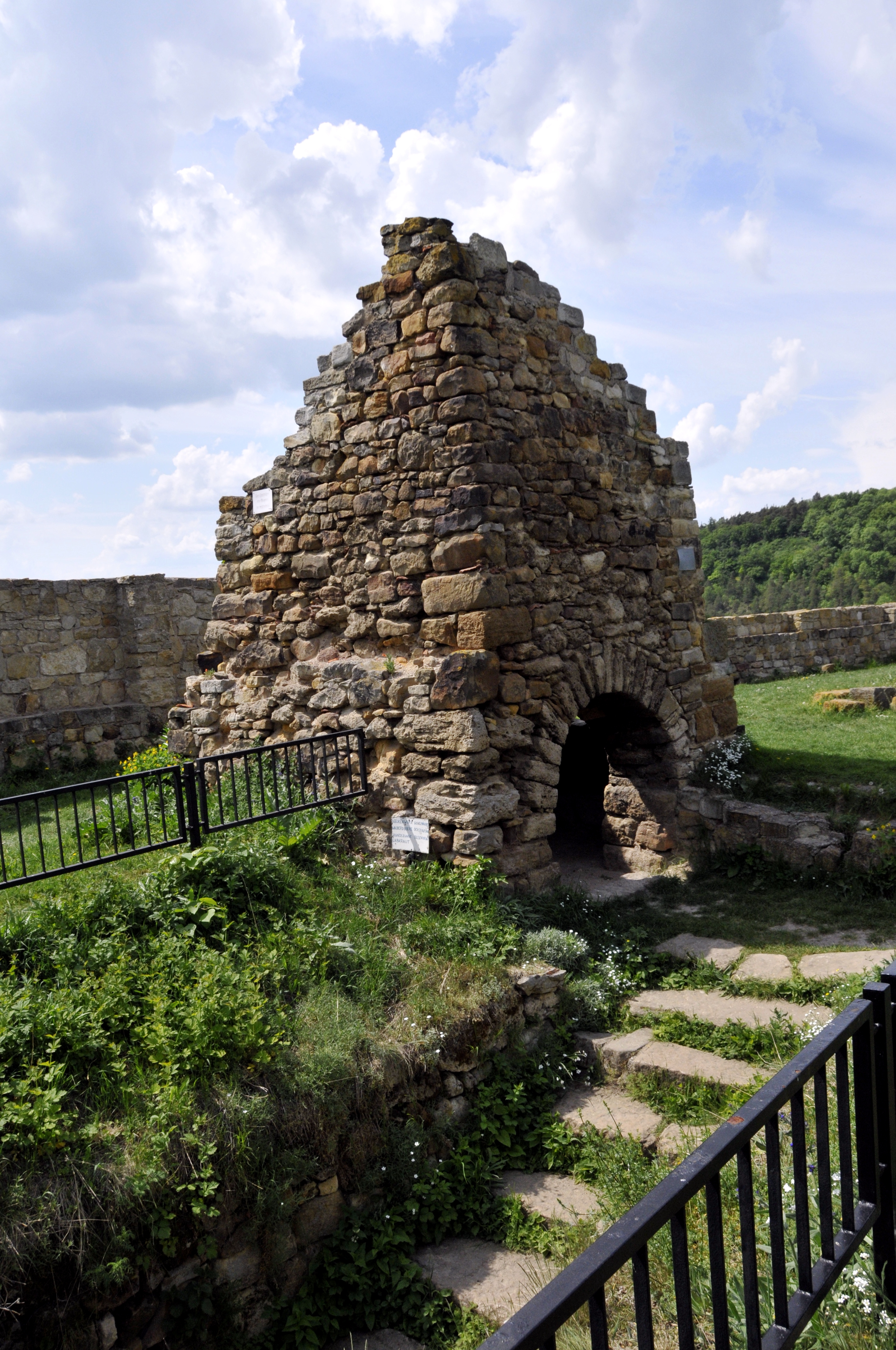 Burg Gleichen, Kamin mit Kellertreppe, Reste des alten Küchenhauses